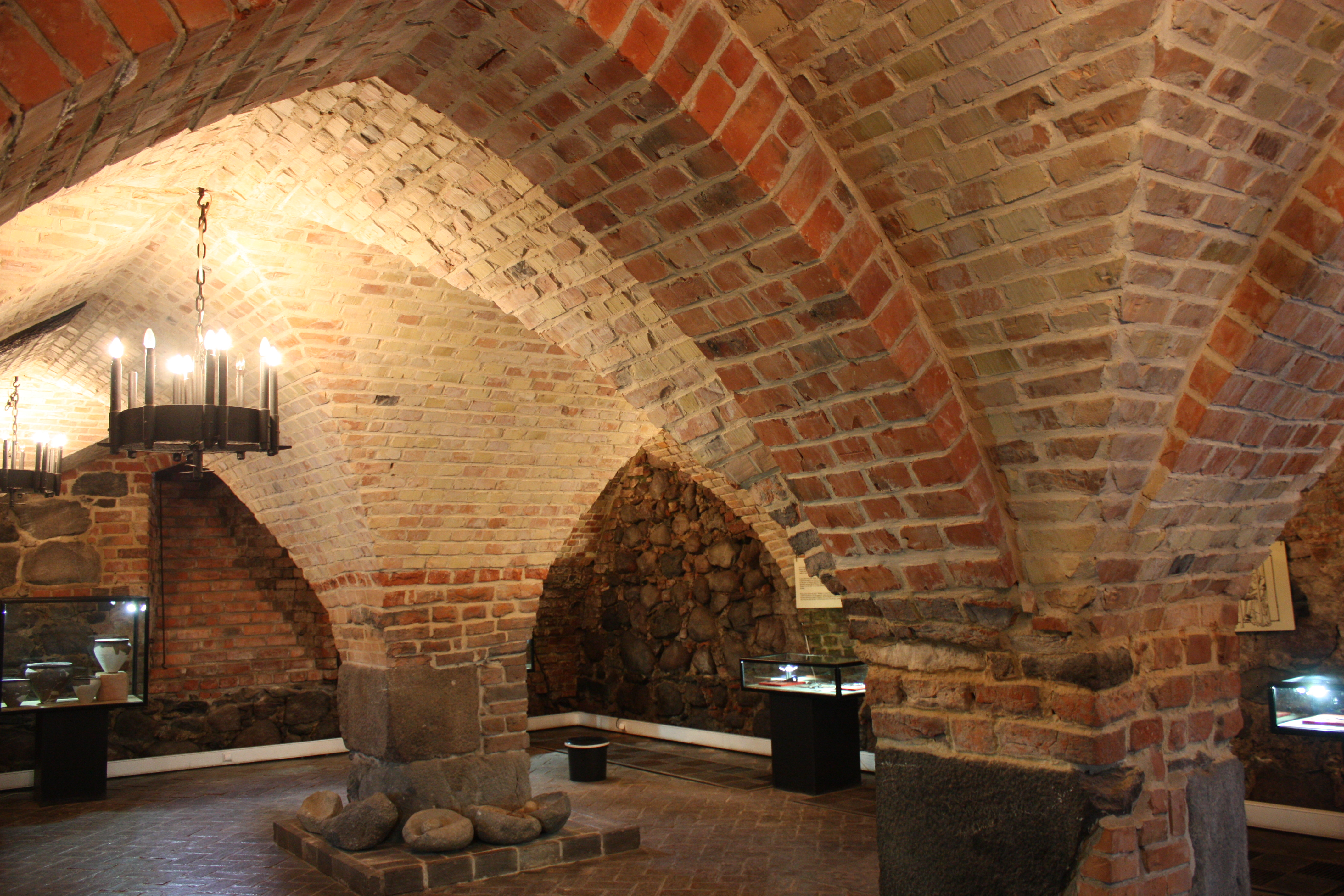 Brodnica, ruiny zamku, pocz. XIV, 1415